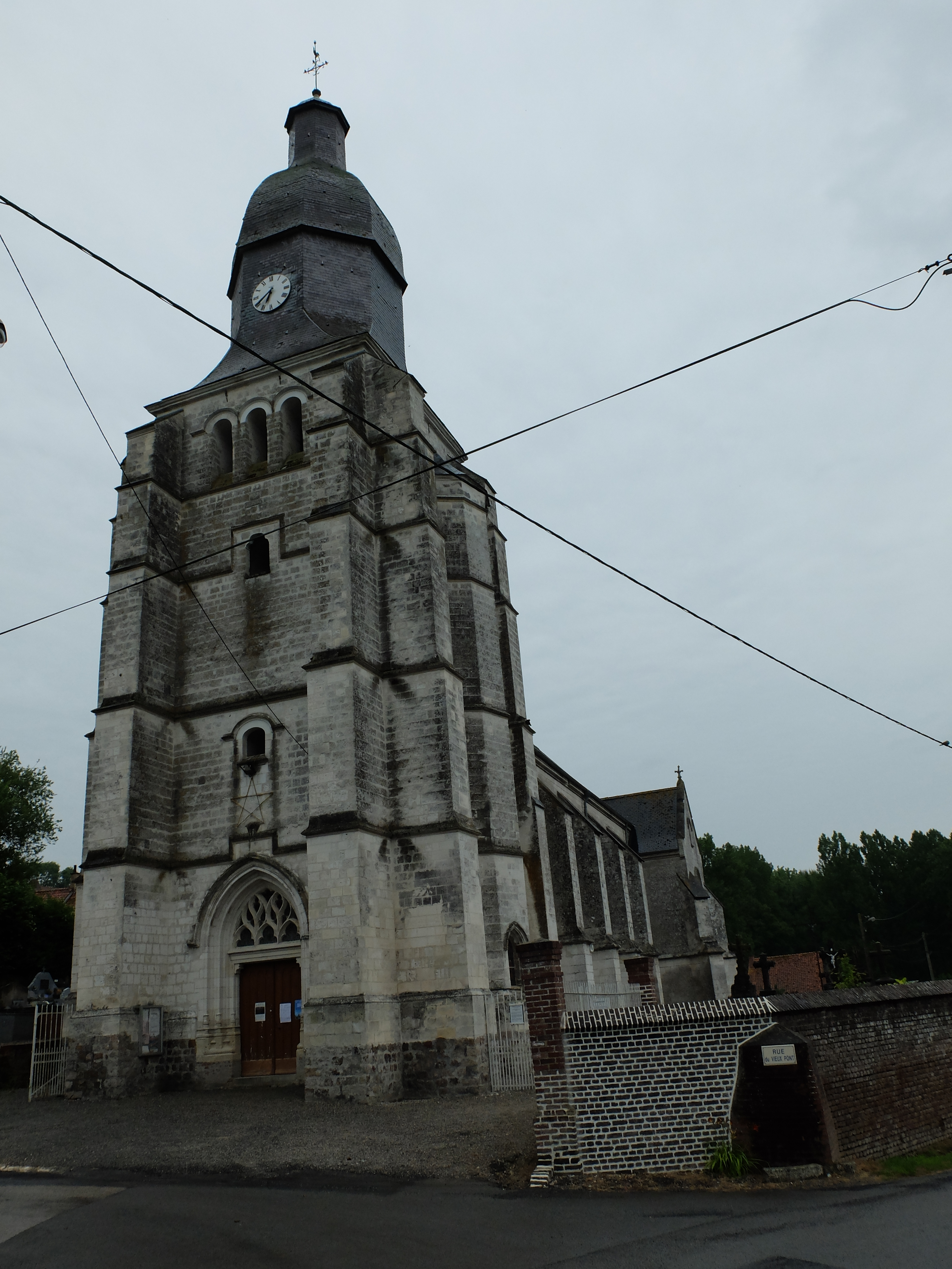 Vue de l'église Notre-Dame de l'Assomption de Fillièvres.